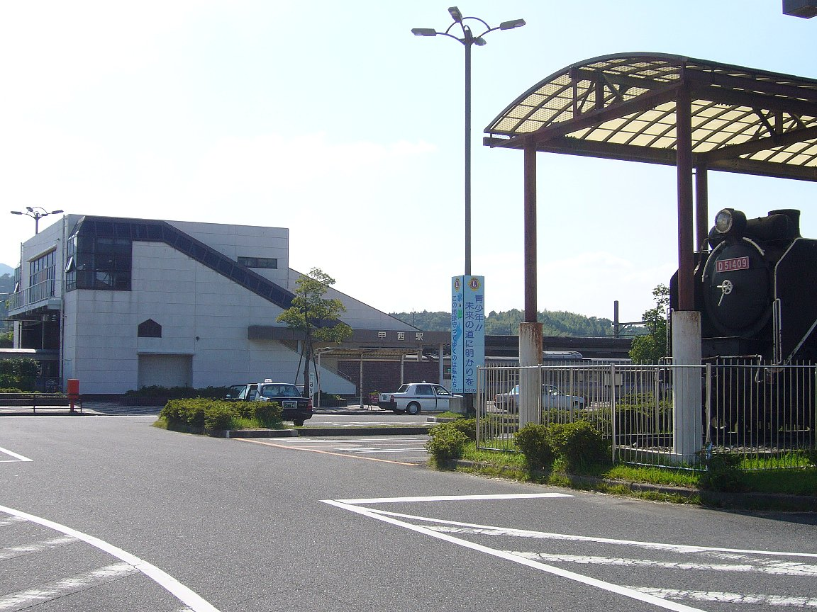 甲西駅駅舎 右手前は、駅前に保存されているD51 409